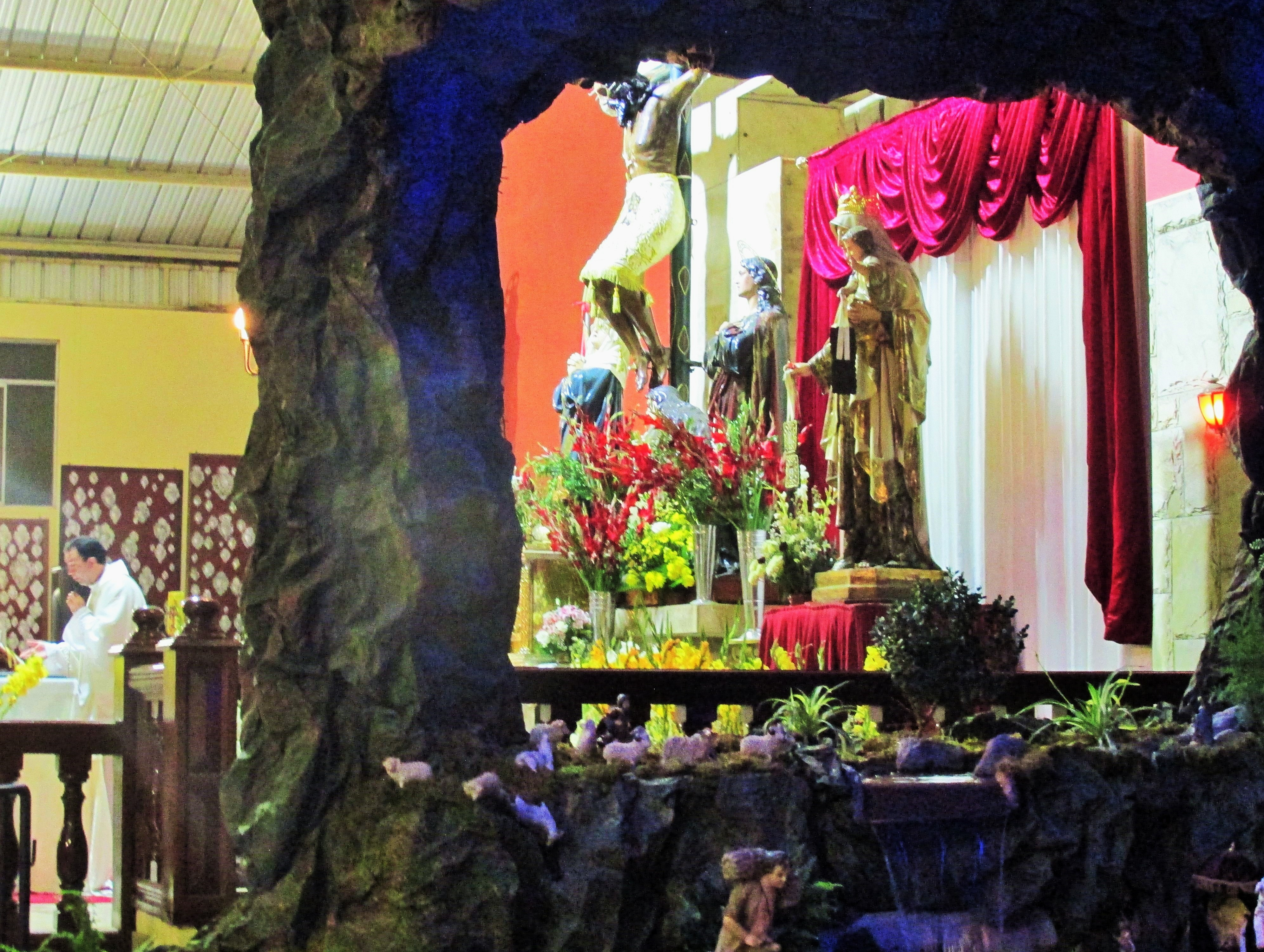 Altar de la Iglesia del Señor de Luren durante la celebración de la Misa de Gallo en la capilla provisional que se construyó después de que el terremoto del año 2007 dañara totalmente la estructura de la Iglesia original.